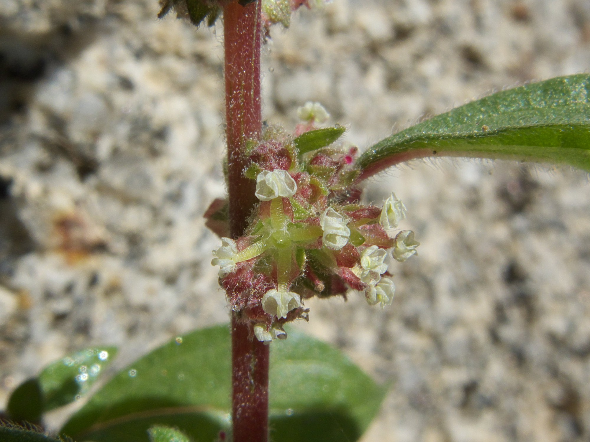 Flor de Parietaria judaica (Urticaceae, Rosales). El Escorial, Madrid, España.